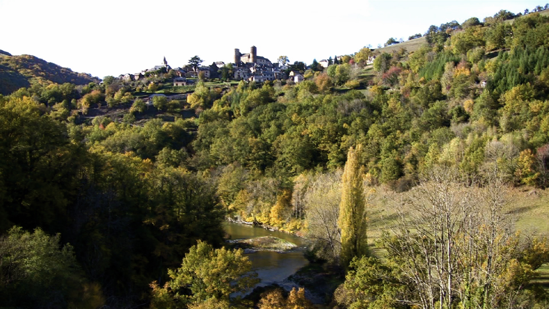 Haute vallée du Lot (Pomayrols-Aveyron-France)